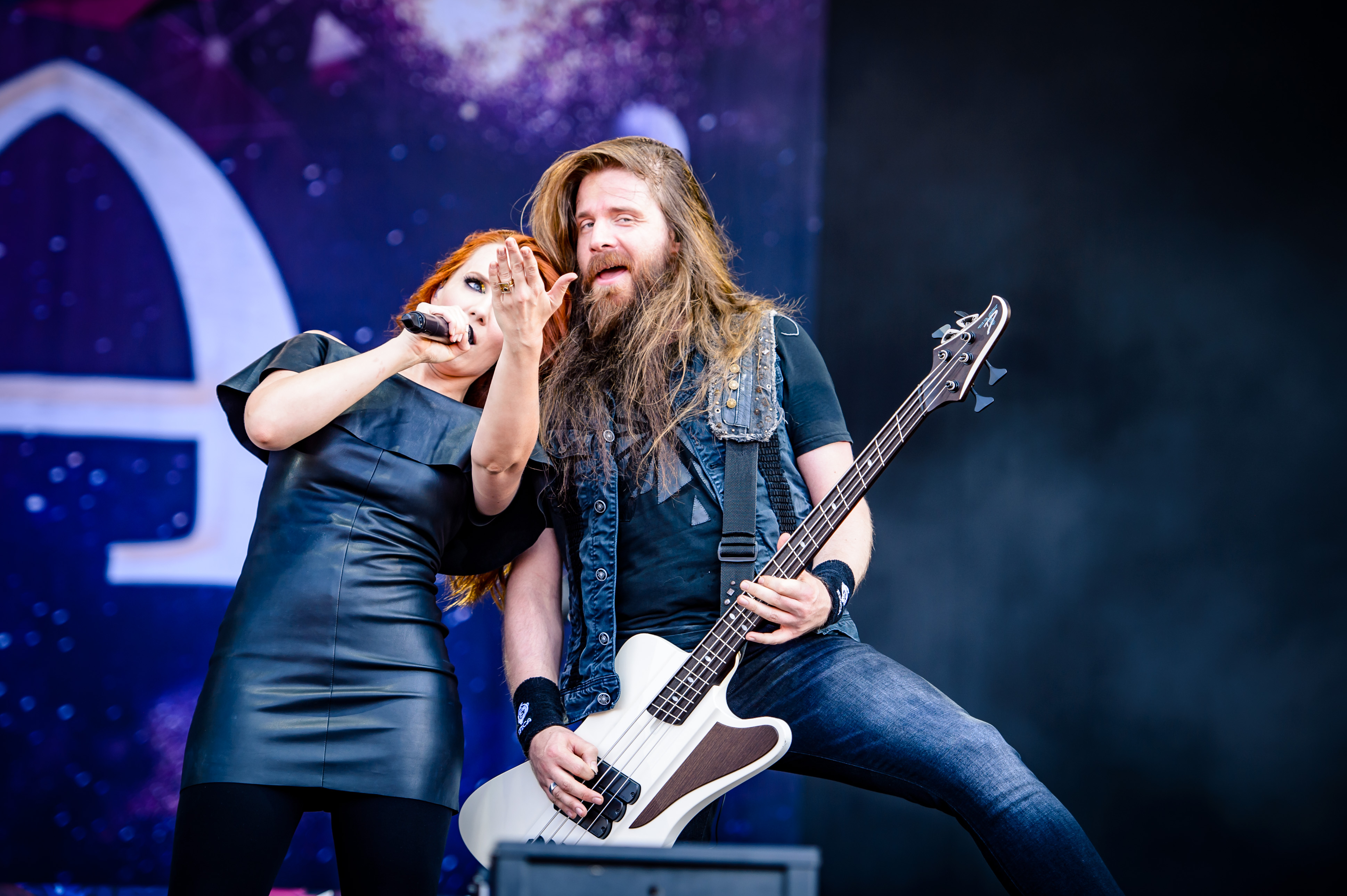 'Wacken Open Air 2018': 'Epica'